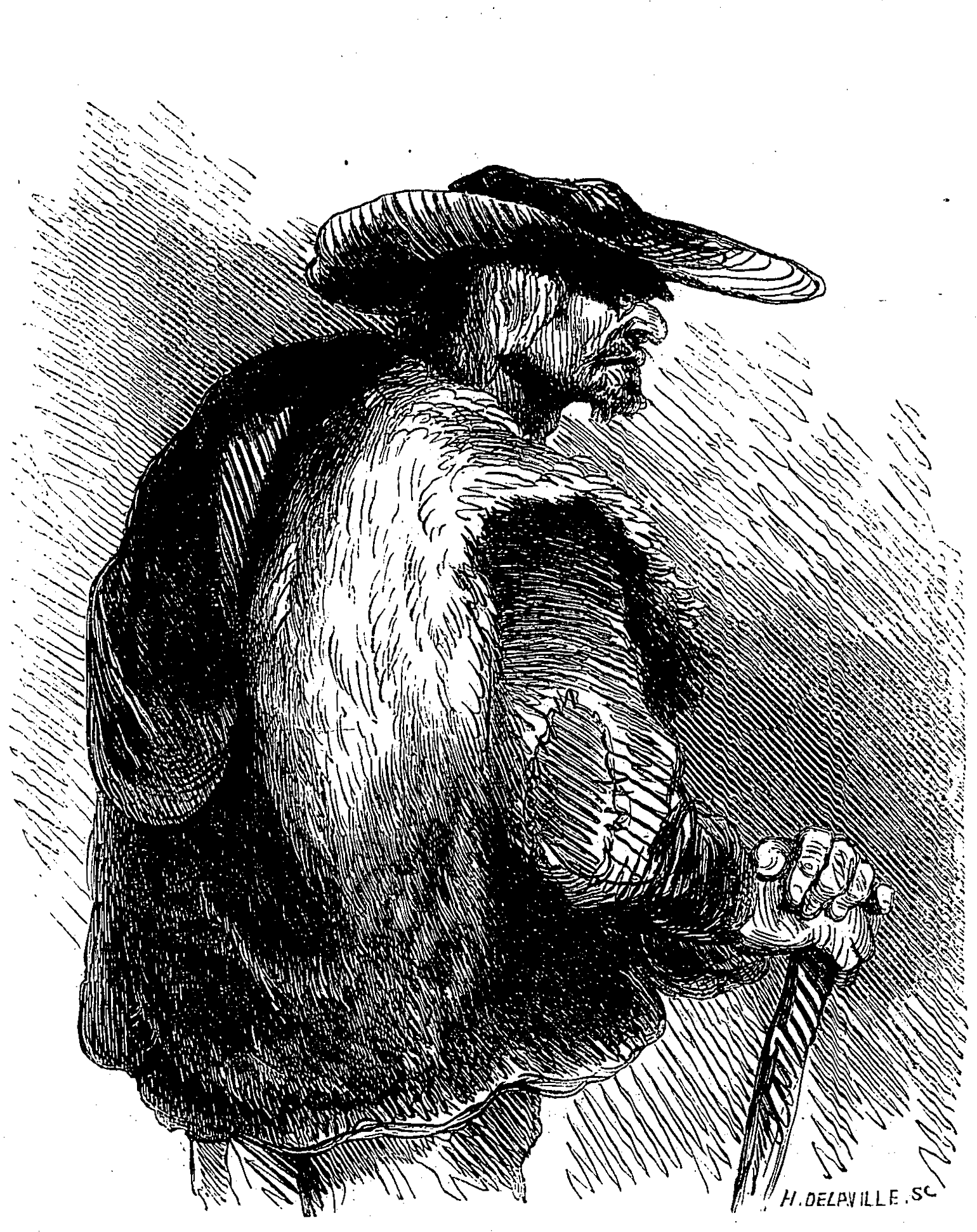 Raguet Bridevache.Dessin en noir et blanc de Tony Johannot (gravure de A. Delaville) pour les Œuvres illustrées de George Sand, Jeanne, Paris, Jules Hetzel éditeur, volume 3, 1853.